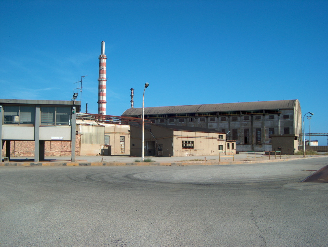 La vecchia fabbrica di Pertusola Sud, Crotone.